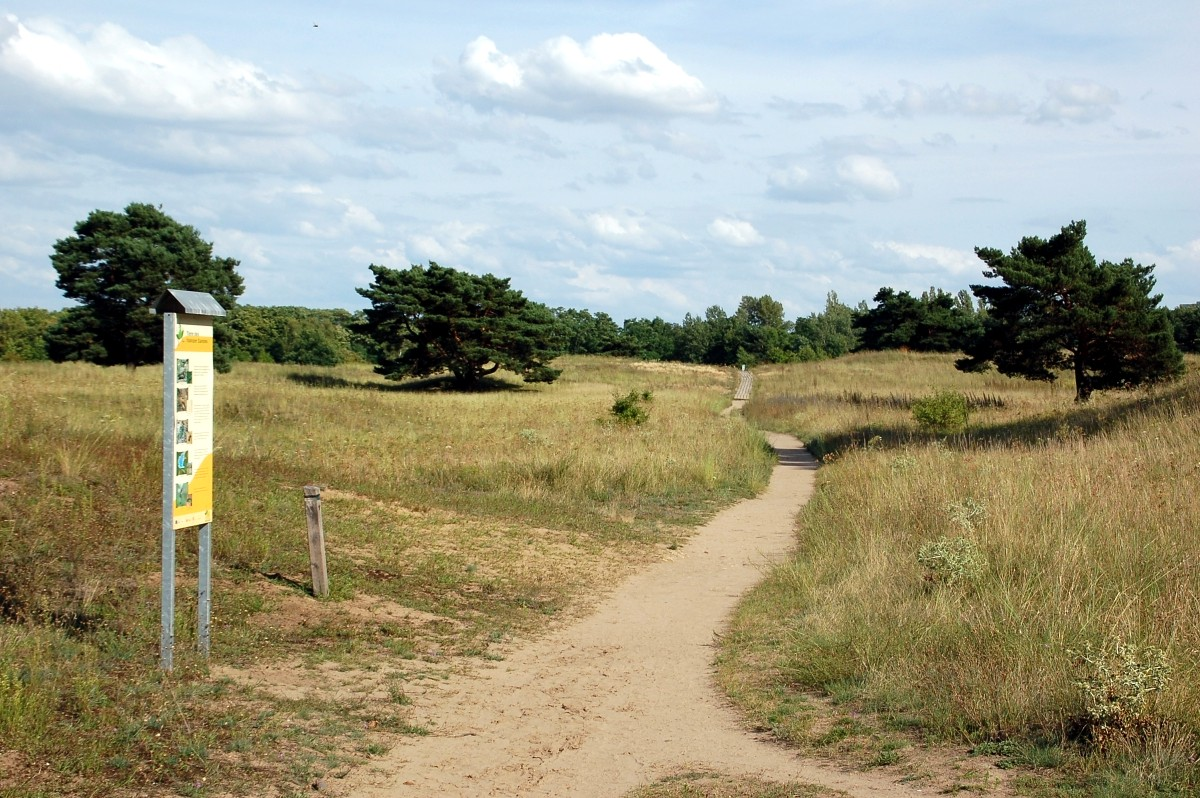 Mainzer Sand, Rheinland-Pfalz, Deutschland